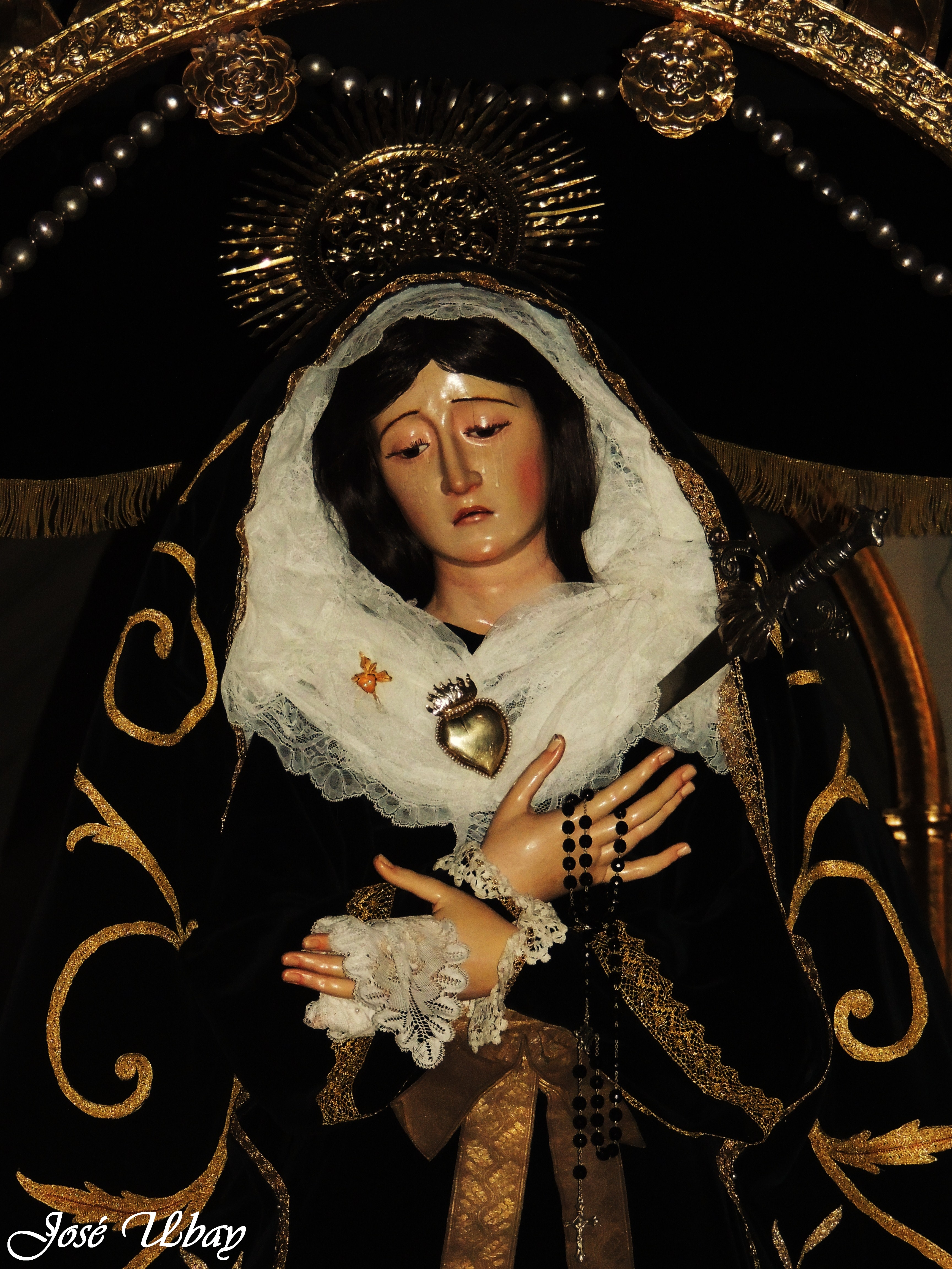 Nuestra Señora de la Soledad. Siglo XVI. Anónimo. Parroquia de Santo Domingo de Guzmán. San Cristóbal de La Laguna.